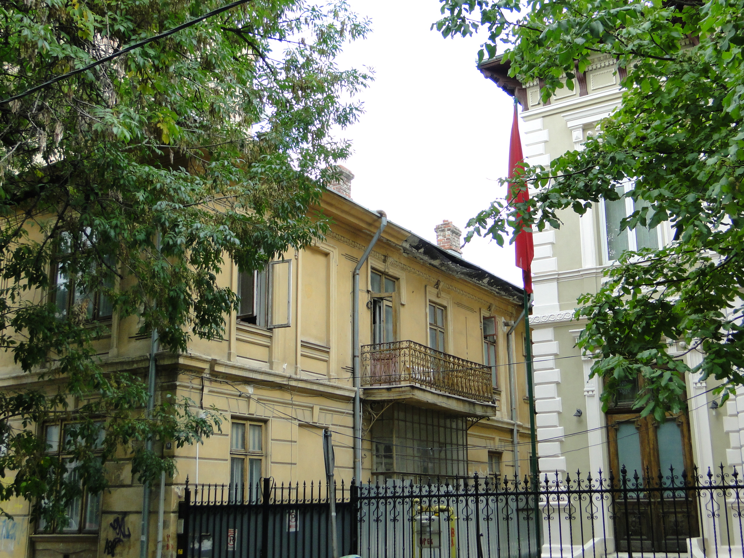 Casa Gheorghe Țițeica